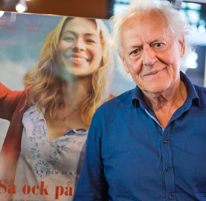 Kay Pollak under presentationen av den Svenska filmhösten 2015 i Filmhuset i Stockholm den 17 augusti 2015.